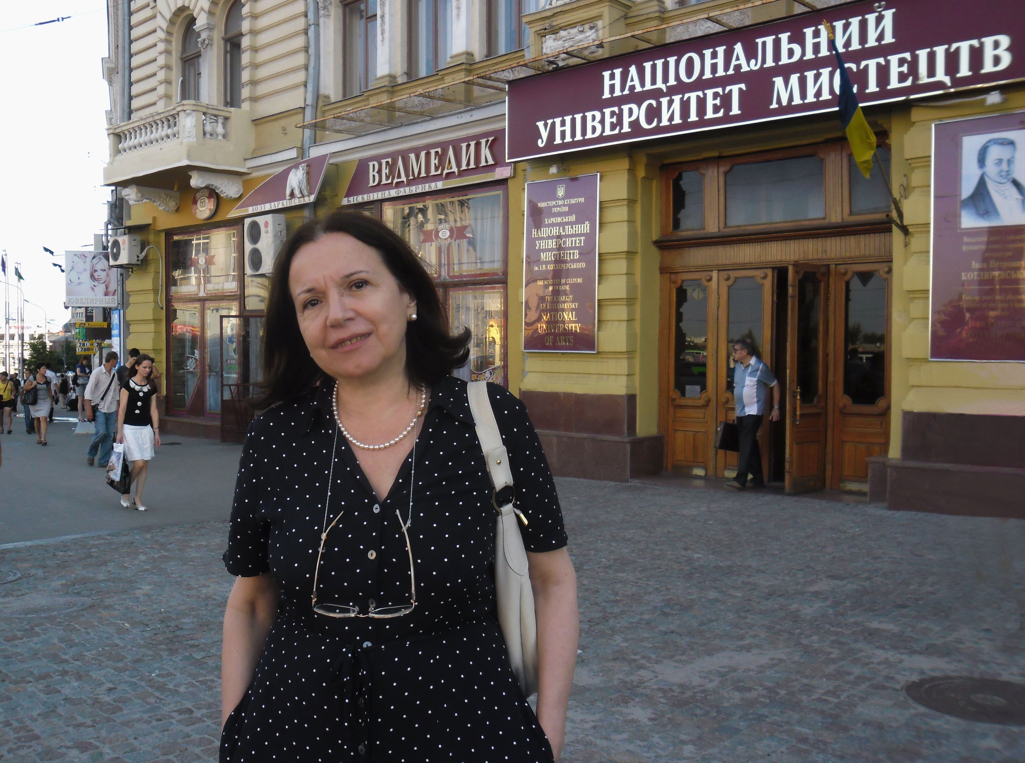 Веркина Татьяна Борисовна